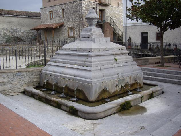 Fuente de los 12 caños que preside la plaza de Nanclares de la Oca (Álava)